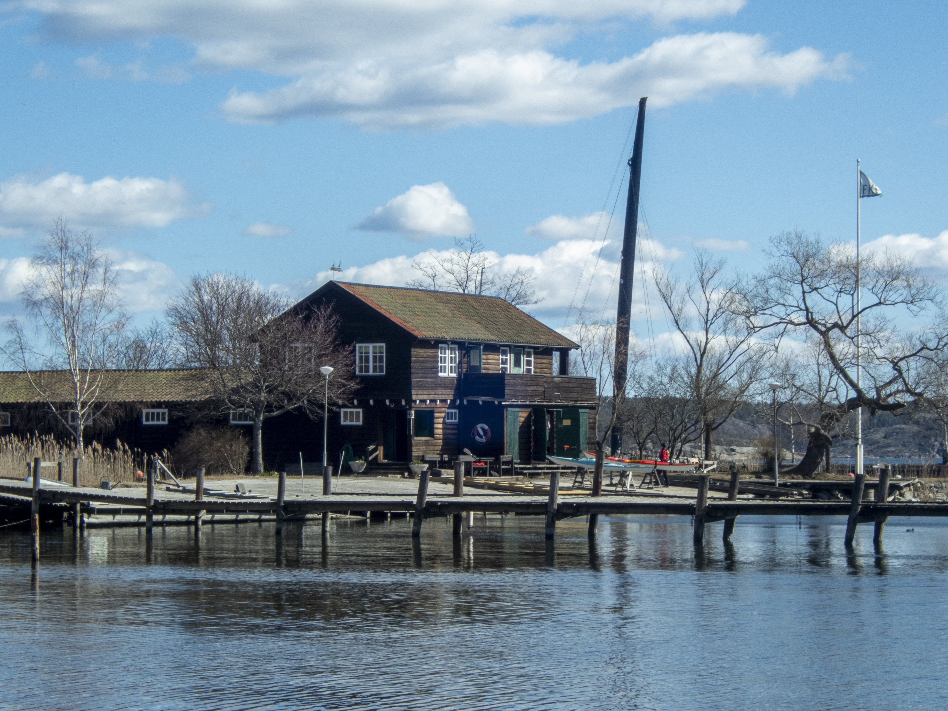 Föreningen för Kanot-Idrott på Måsholmen, Djurgården. Klubbhuset invigdes 1913. Arkitekt: Simon Svensson